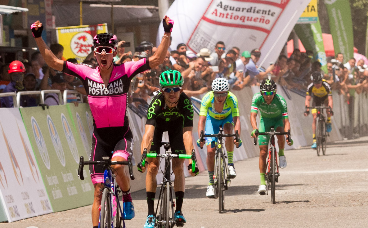 Wilmar Paredes venció en el embalaje a Edwin Carvajal y a Nicolás Paredes. Etapa 2 Vuelta a Colombia 2017 Miércoles 2 de agosto de 2017. Rionegro - Puerto Boyacá.